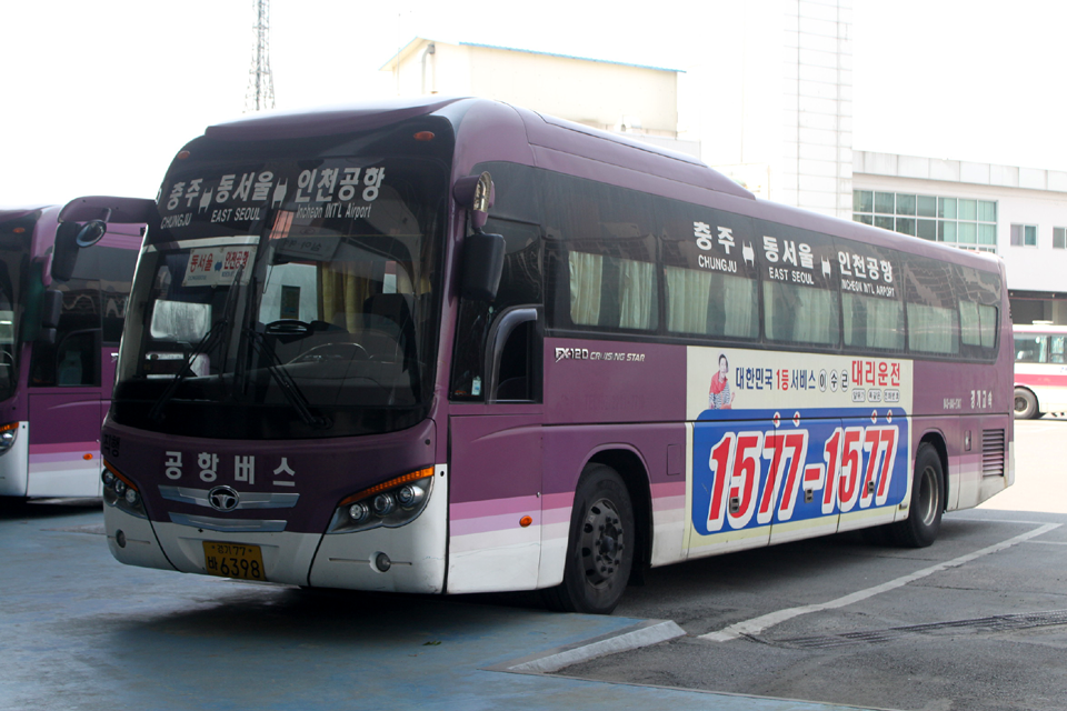 경기고속 대우 FX120 크루징스타